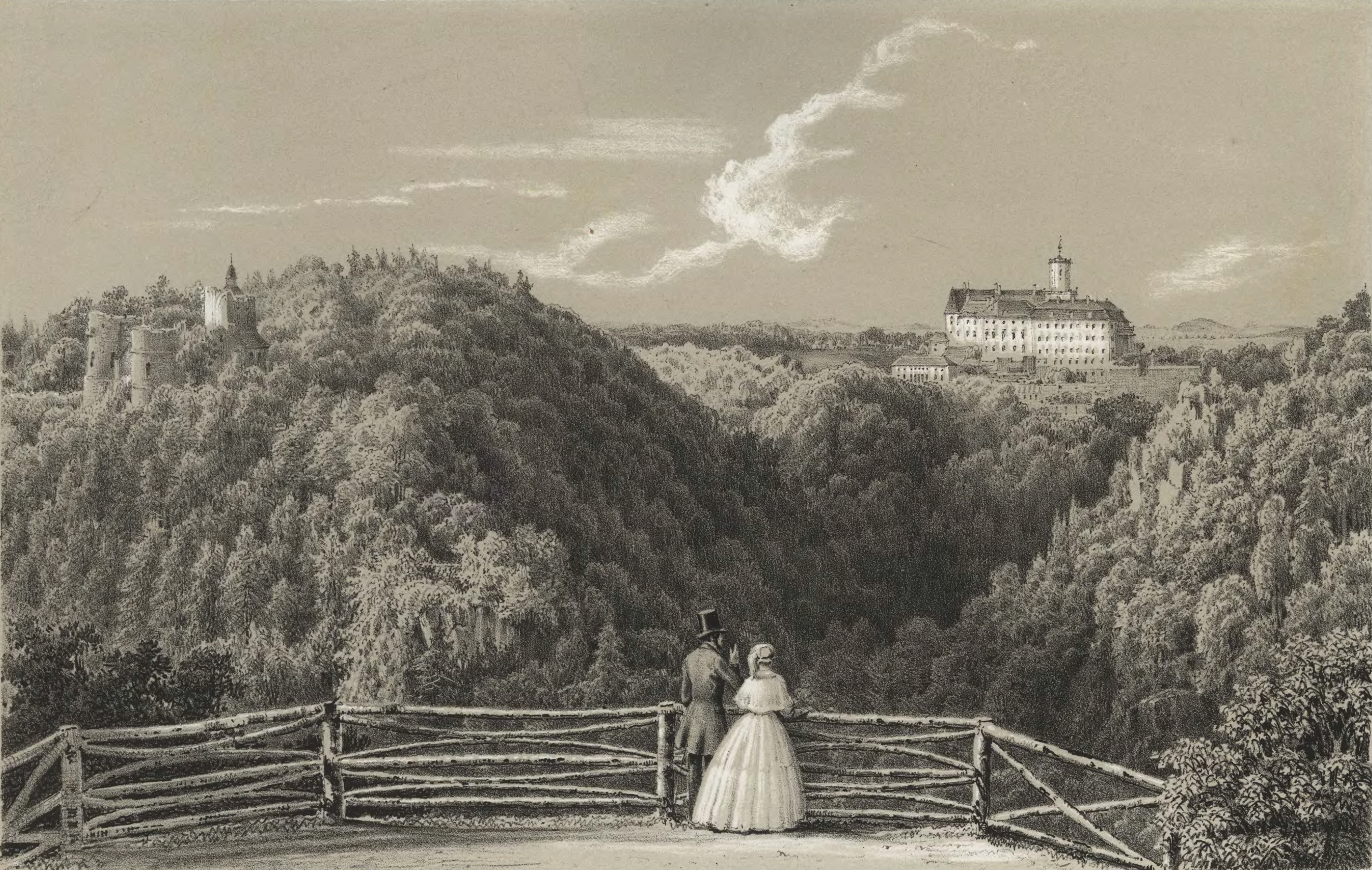 Fürstenstein im 19. Jahrhundert. Blick auf Burg und Schloss Fürstenstein. Zeichnung von Ferdinand Koska, Lithografie von Wilhelm Loeillot (1827–1876).